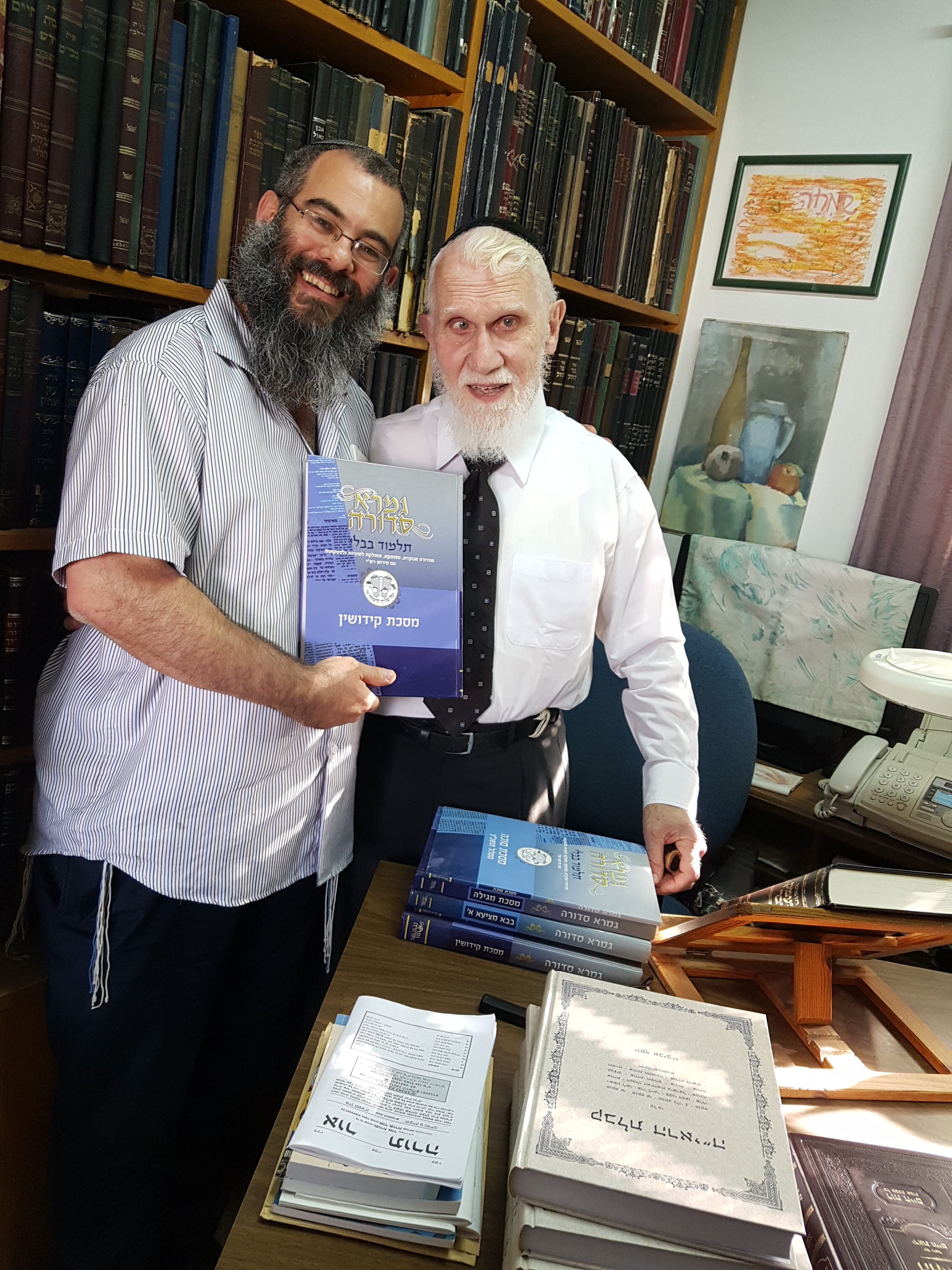 הרב דוד פוקס עם הרב דניאל ברק ווינט